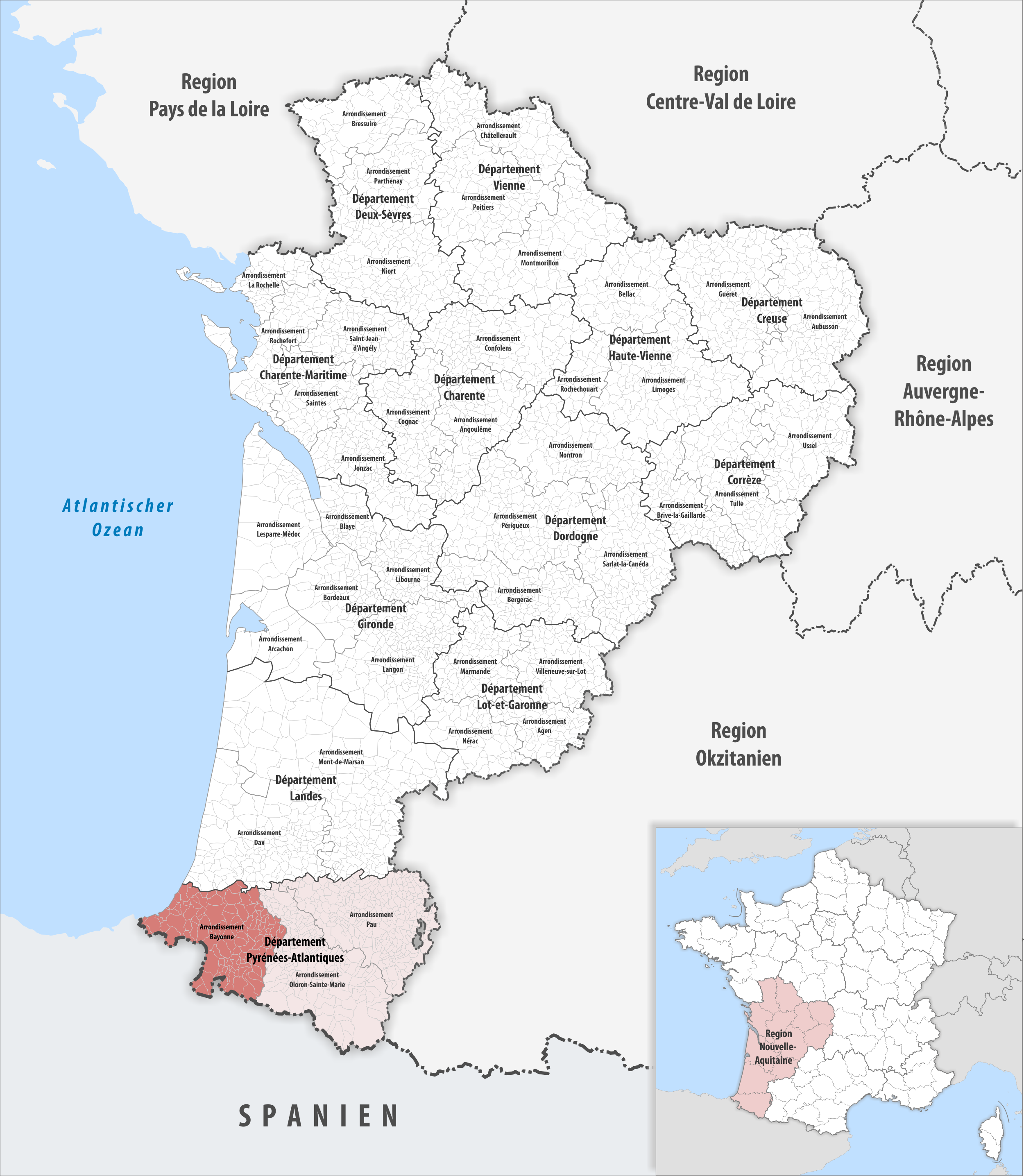 Lage des Arrondissements Bayonne